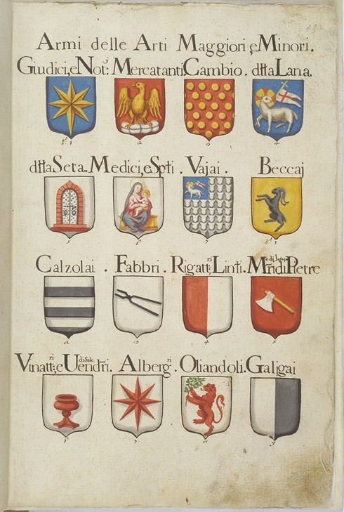 Armi delle arti fiorentine maggiori e minori (AS Firenze, Fondo Manoscritti, 471, c. 13, sec. XVIII)